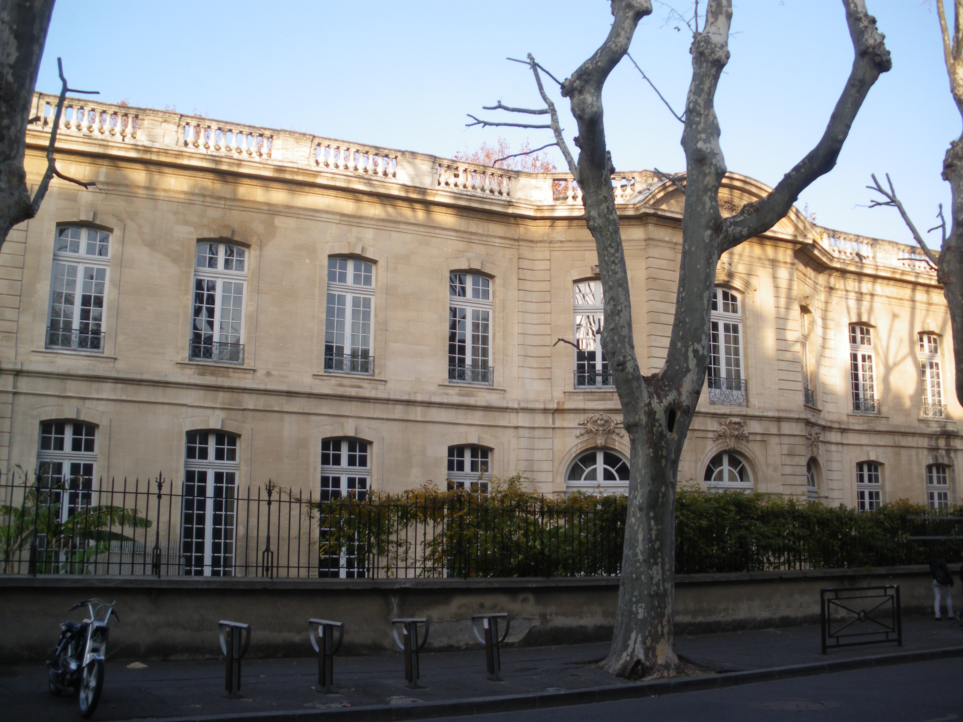 Hotel Caumont, Avignon